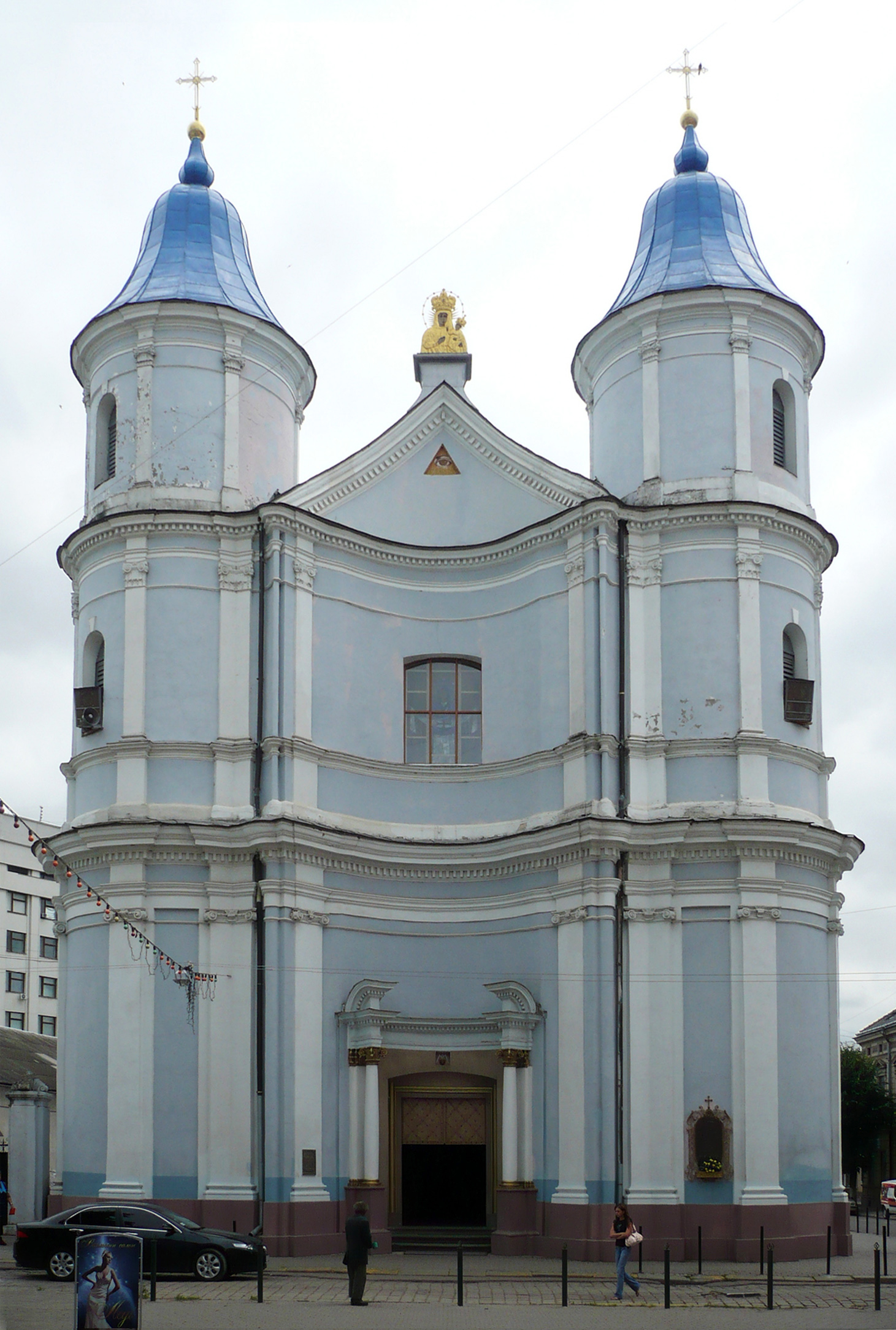 Kościół Ormiański Iwano-Frankiwsku